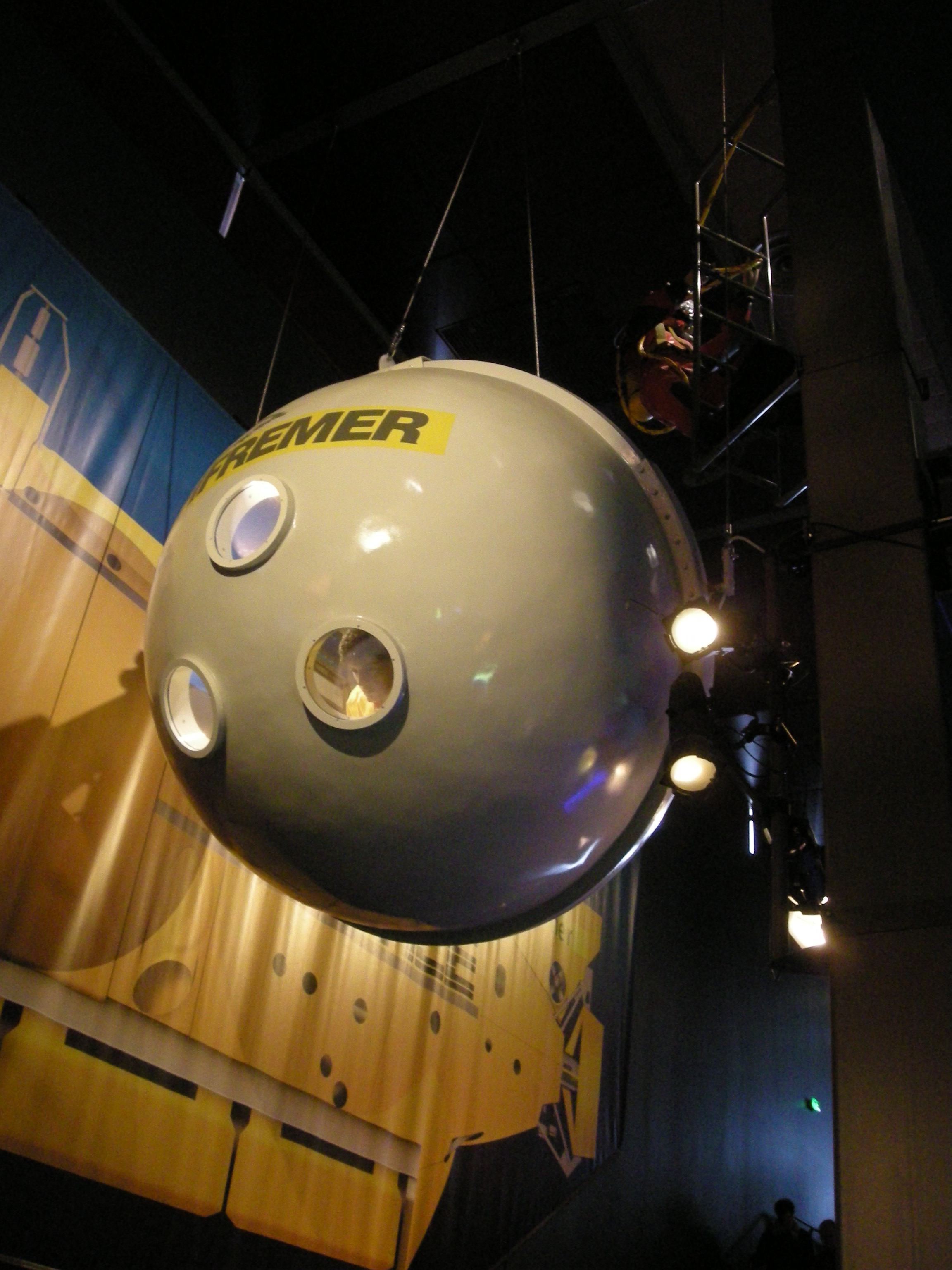 Engin d'exploration sous-marine IFREMER à la Cité de la Mer de Cherbourg, Normandie